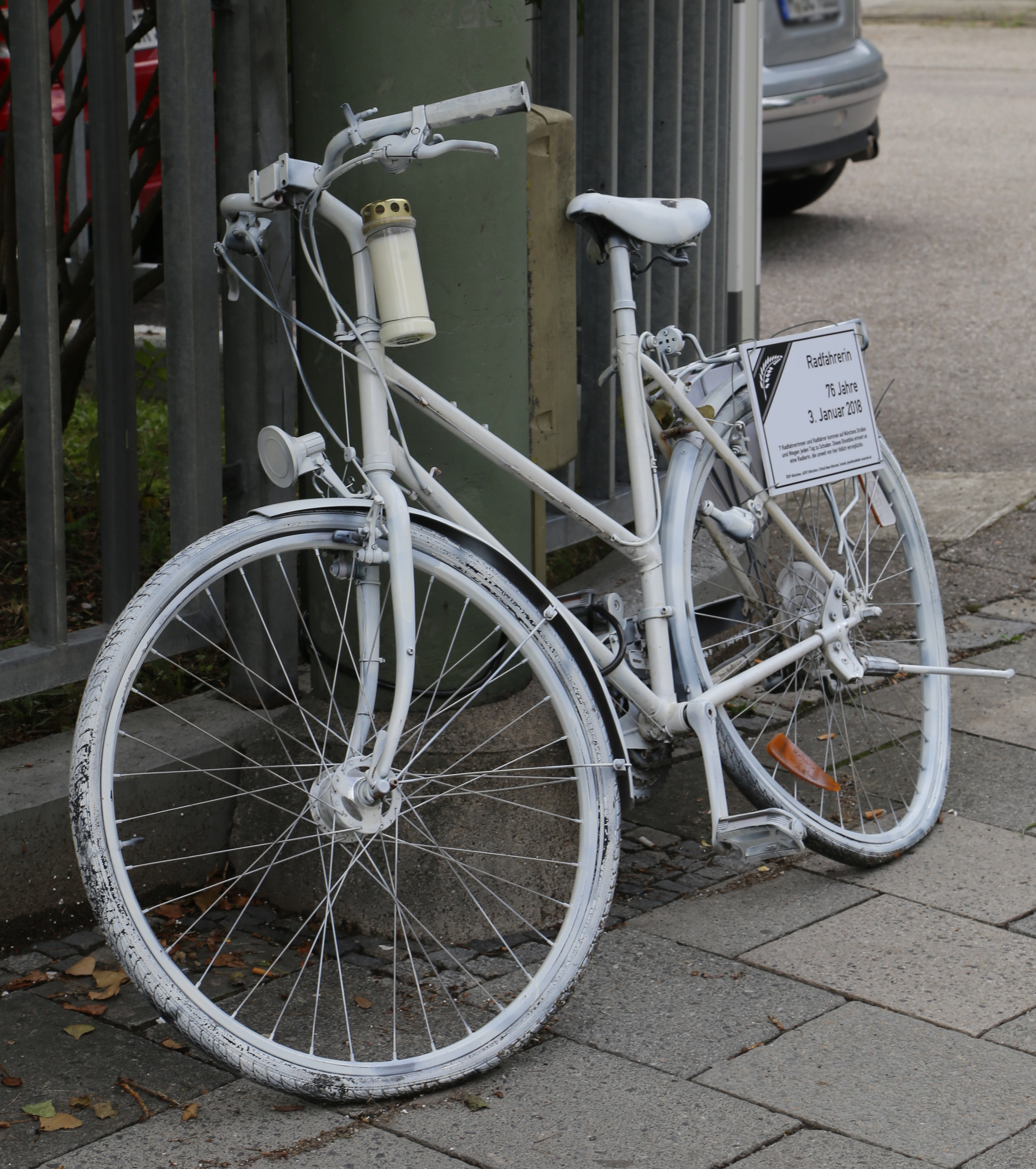 Ghost Bike, Hofmannstraße 50, Obersendling, München